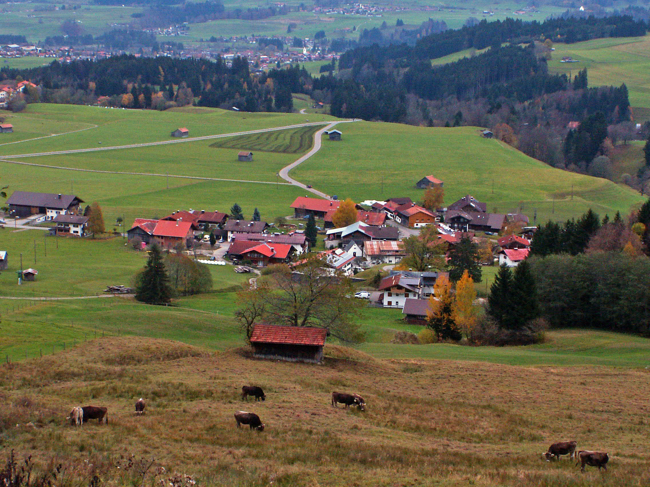 Sonderdorf von Westen, Bolsterlang